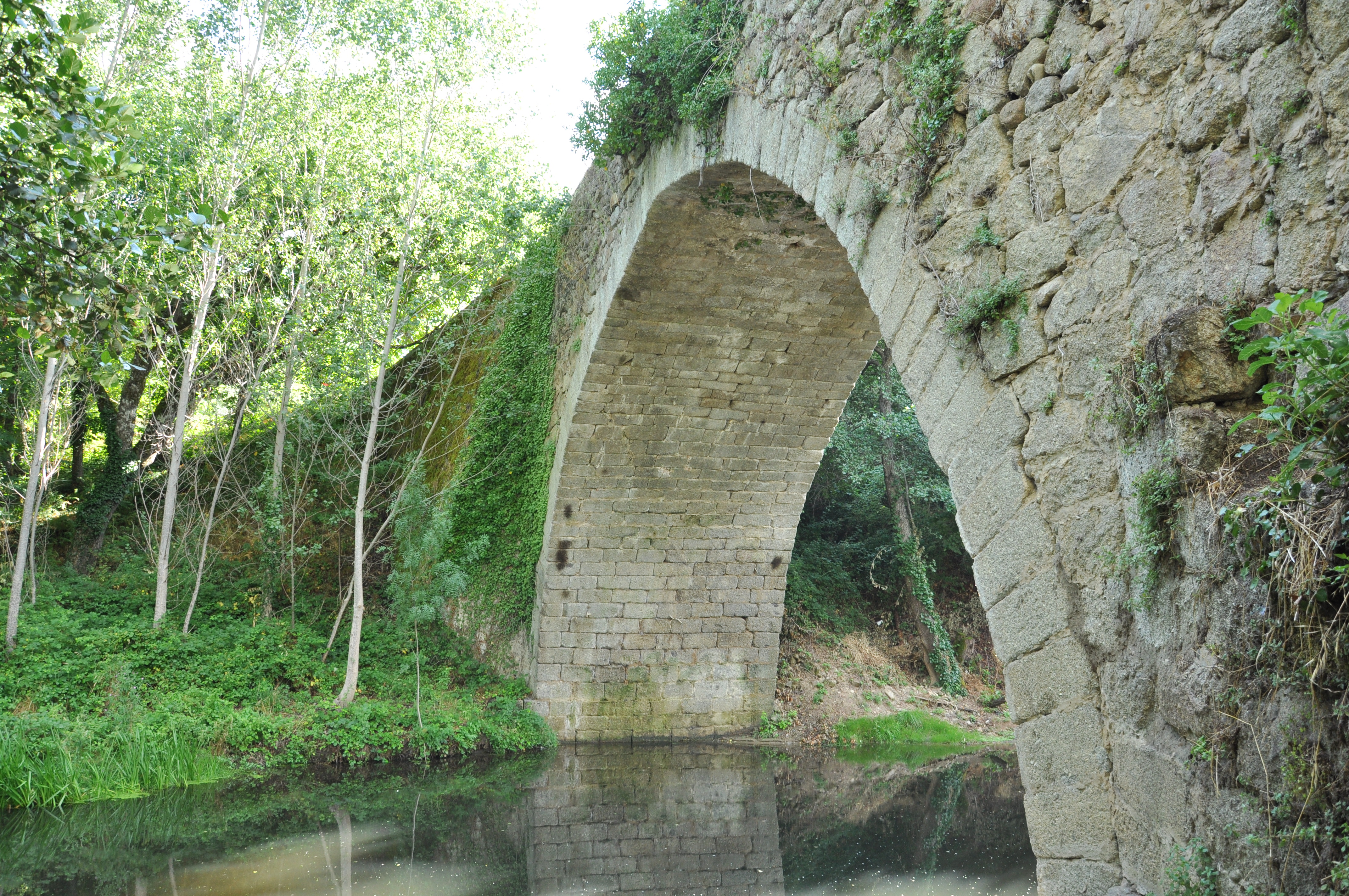 Esta ye una semeya del ponte que ta assitiáu encima'l ríu cuerpu d'home